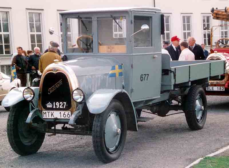 Tidaholm TSL Truck 1927